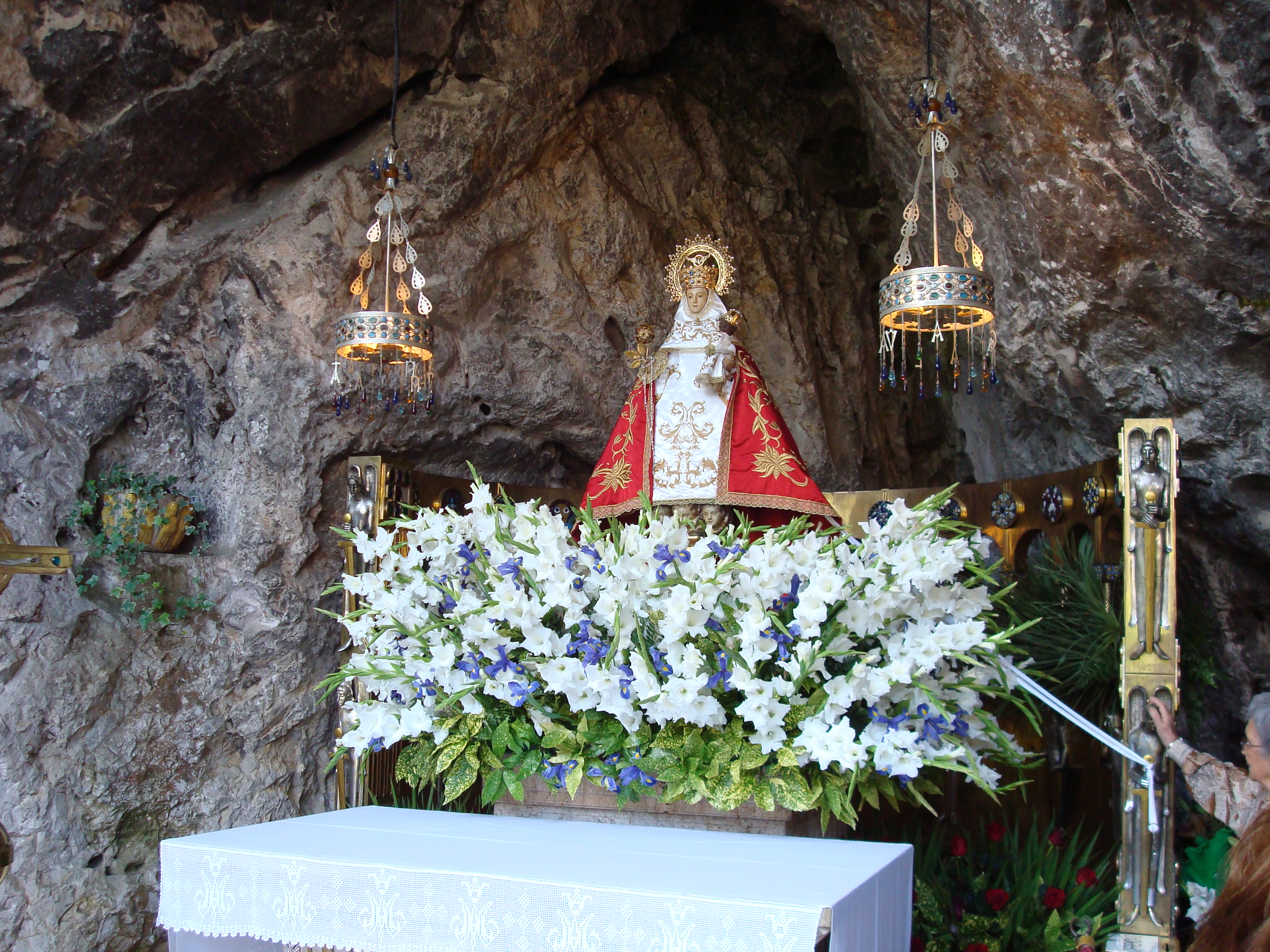 Santuario de Covadonga y alrededores (Cangas de Onis) - 0014